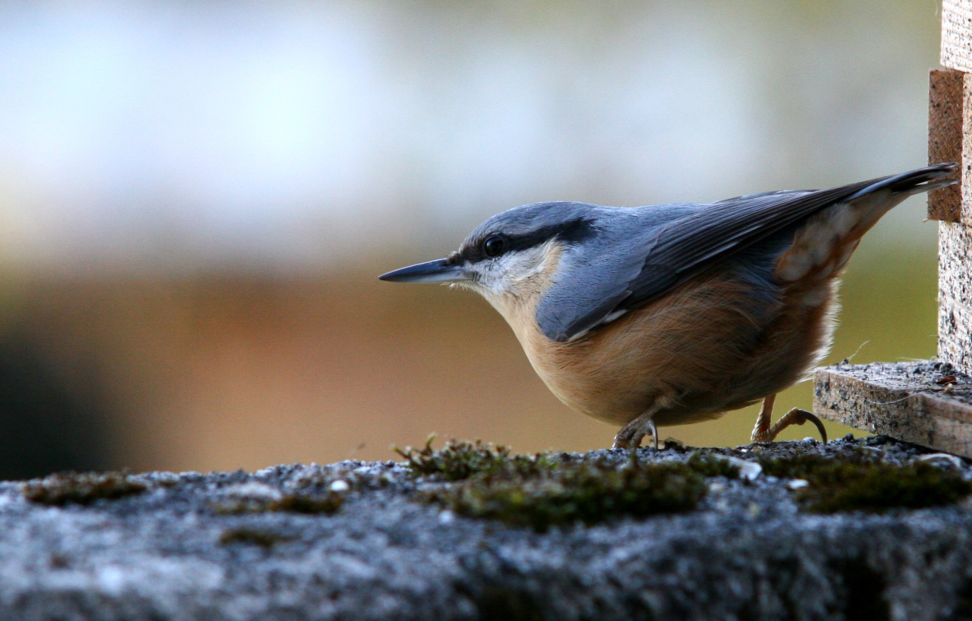 Sitta europaea